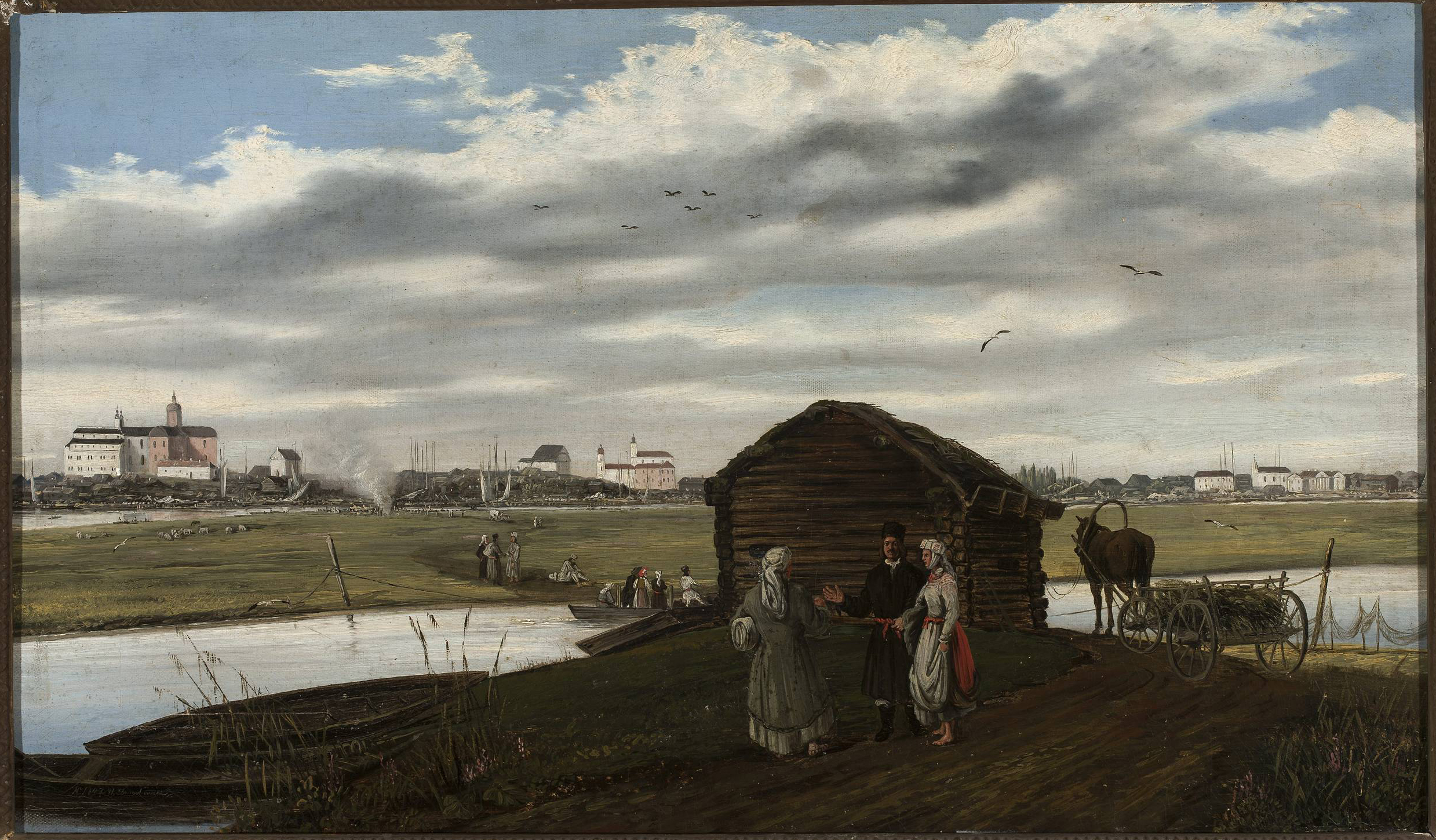 Беларуская (тарашкевіца): Карціна «Ля перавозу»: Пінск (Pinsk), рака Піна (Pina)